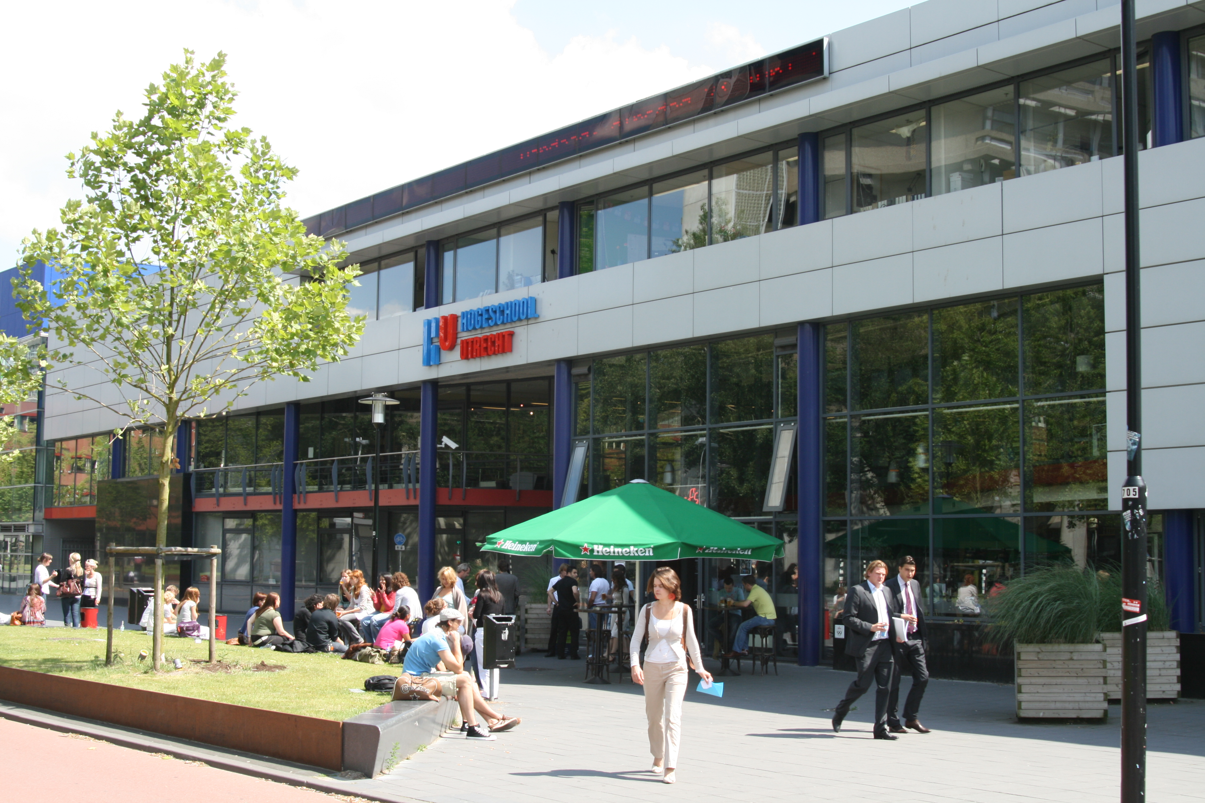 School voor Journalistiek